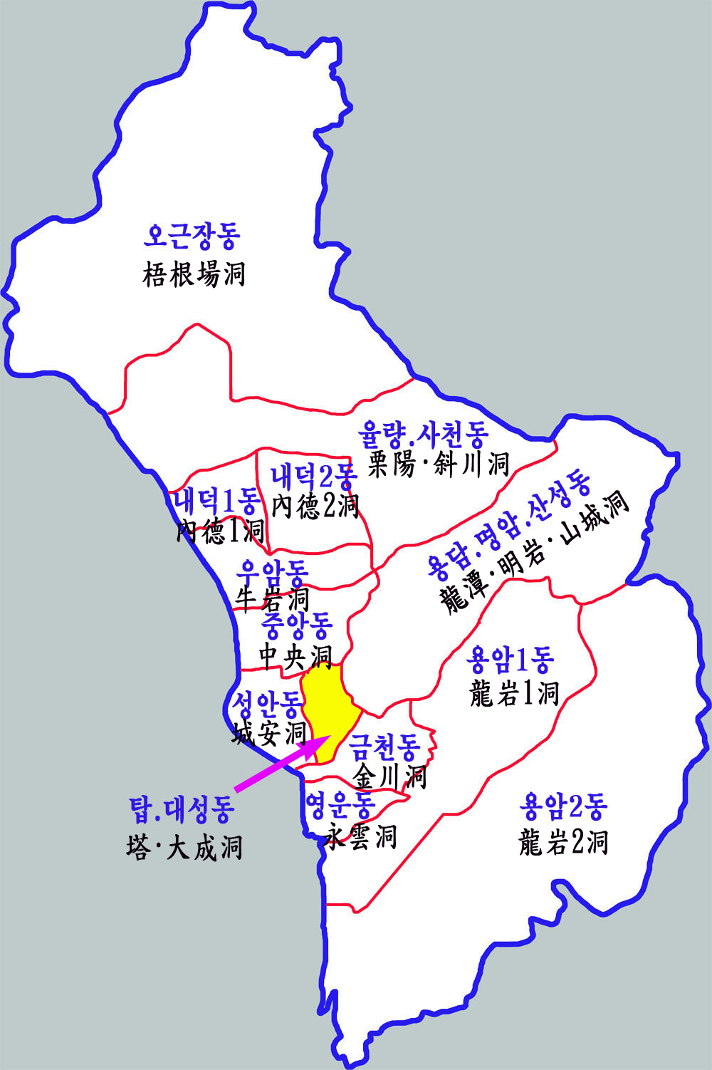 청주시 상당구 행정구역도